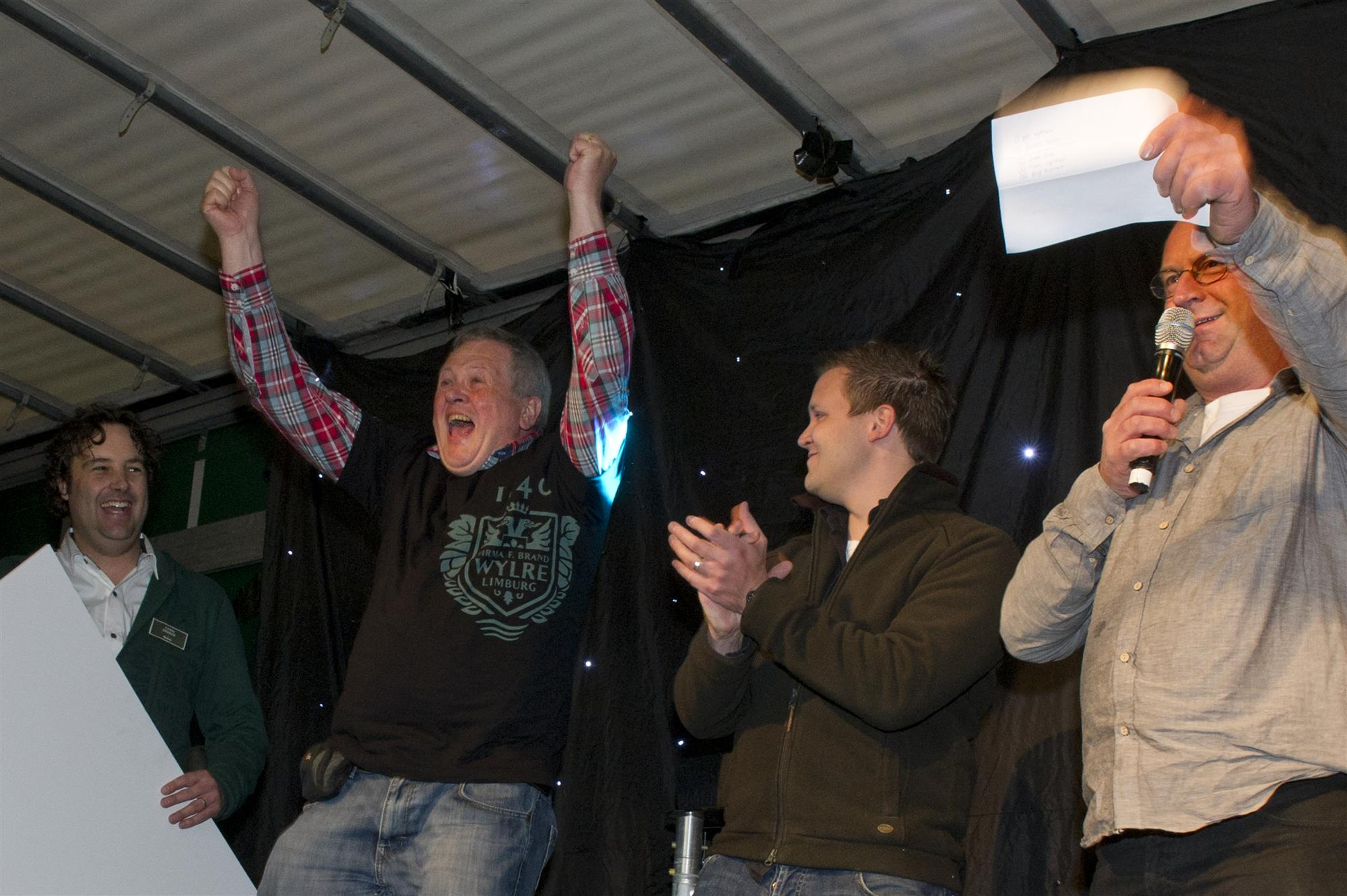 Jacques hoort dat hij de winnaar is van de Brand Bierbrouwwedstrijd 2013. Rechts naast hem staat Rick Linssen uit Beek en Donk die tweede werd.